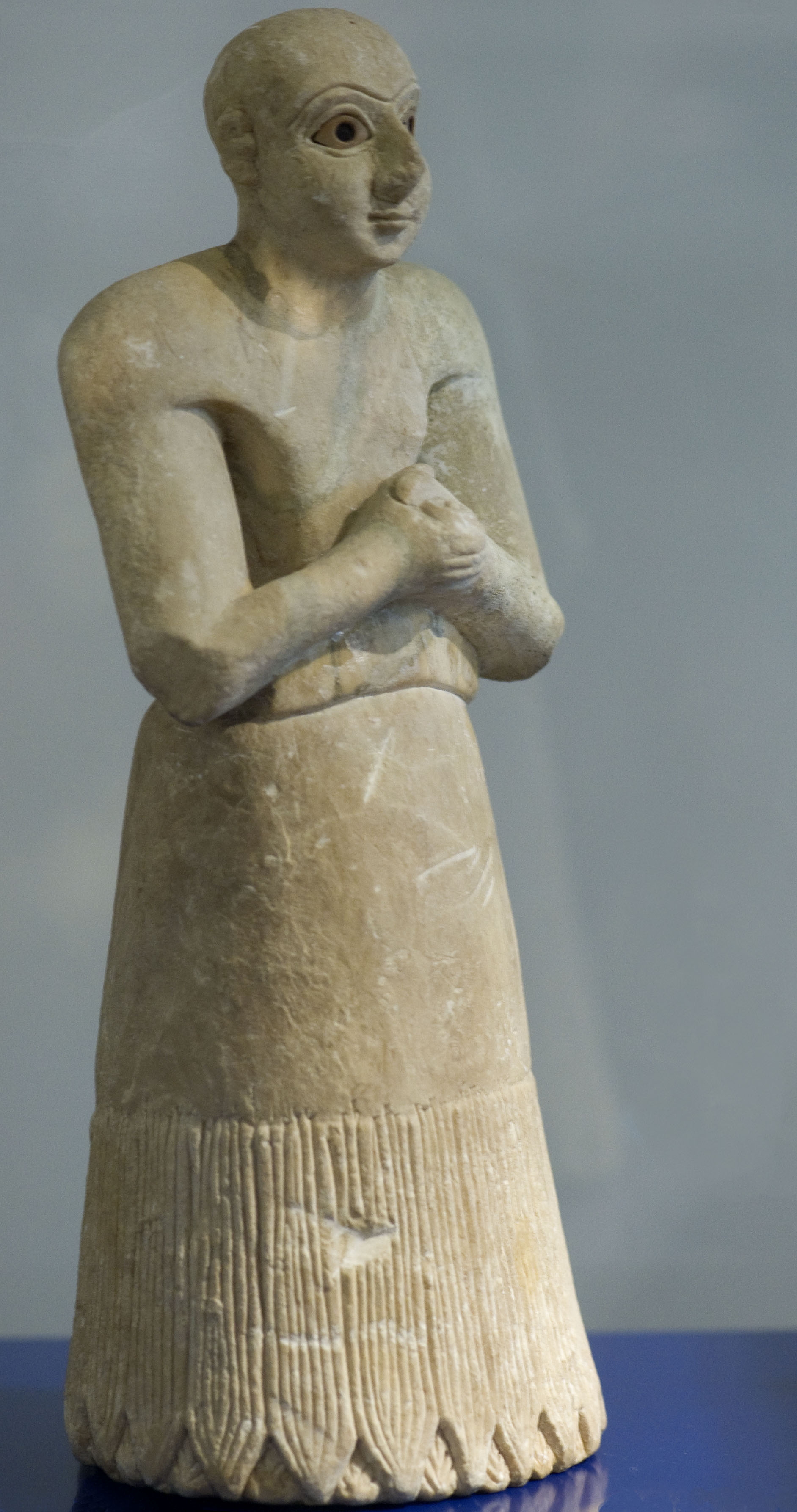 Beeldje van een biddende man Biddend figuurtje (RMO, c. 2500 BC, Irak; Chafadje)